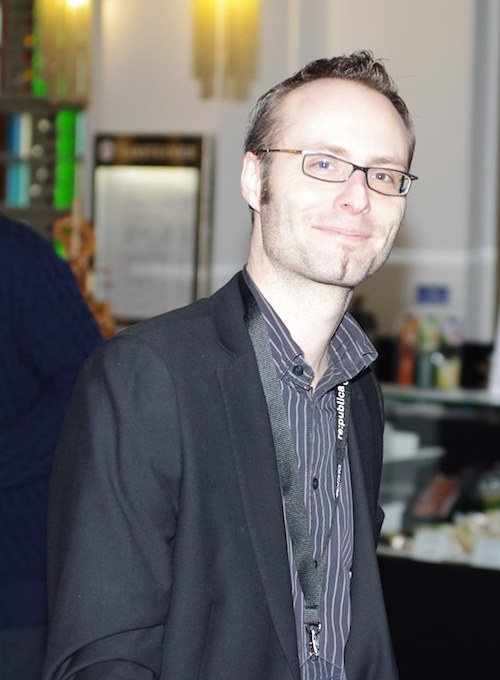 Sabbeljan, Sebastian Basedow